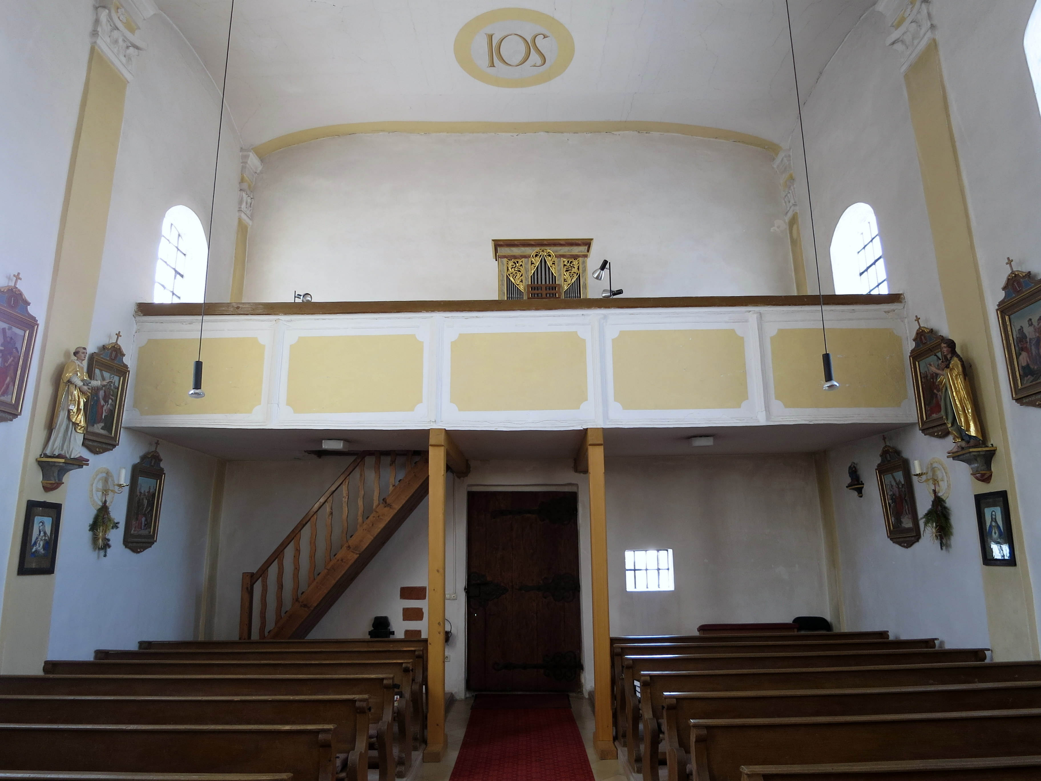 Filialkirche St. Leonhard mit ihrer Ausstattung